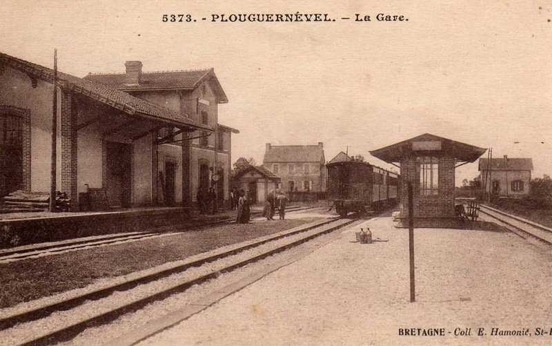 La gare Réseau Breton de Plouguernevel